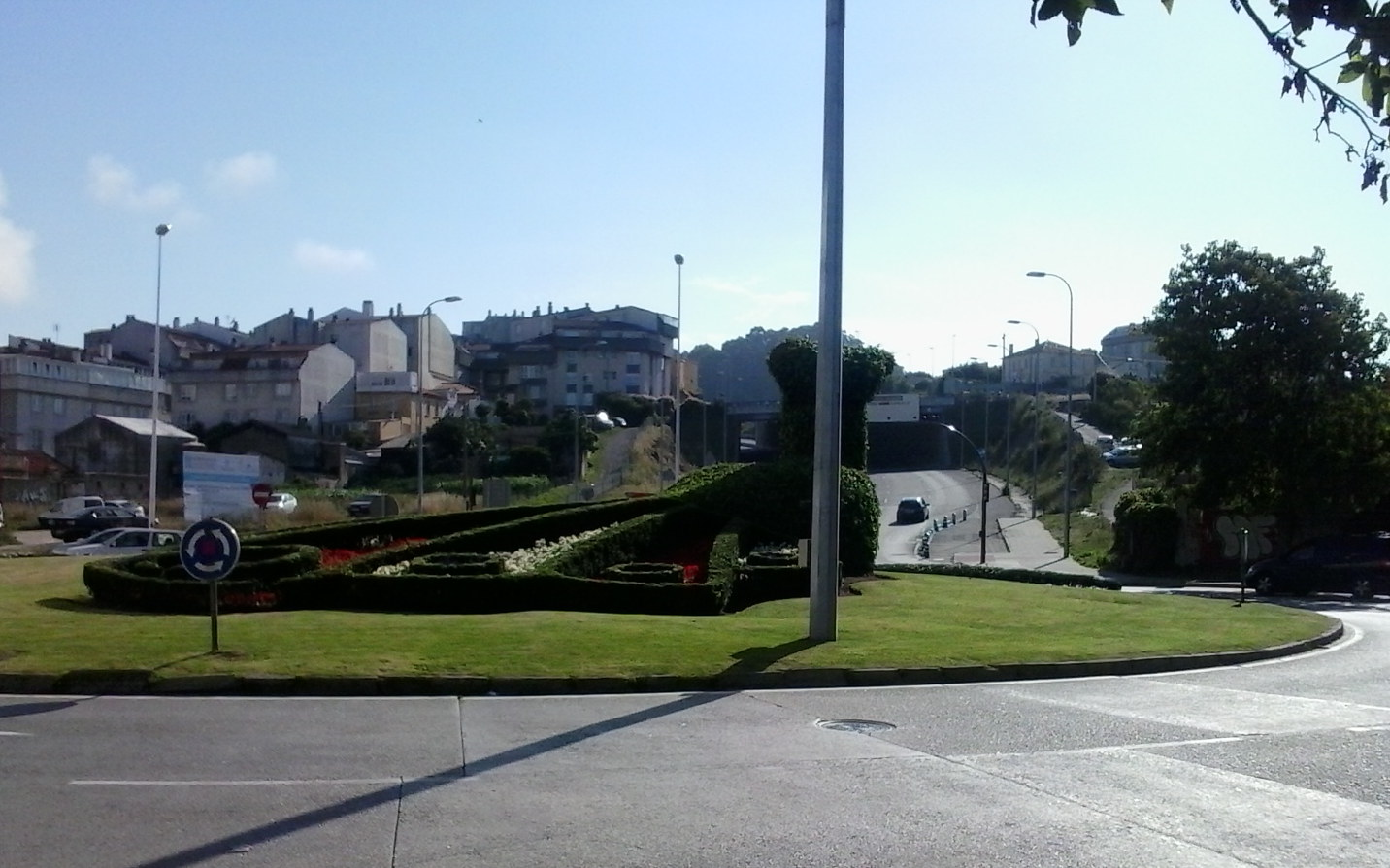 Ronda do Deportivo da Coruña, rotonda do Pavo Real Ronda de Outeiro